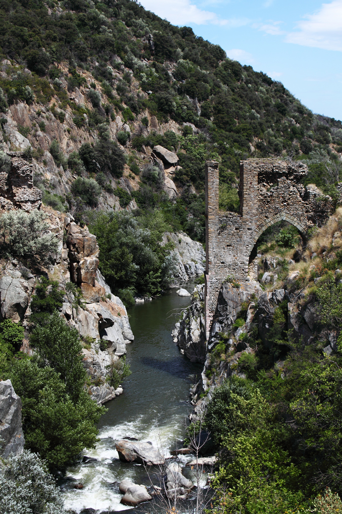 Vue générale du Pont den Labau sur la commune de Rodès dans les gorges de la guillera